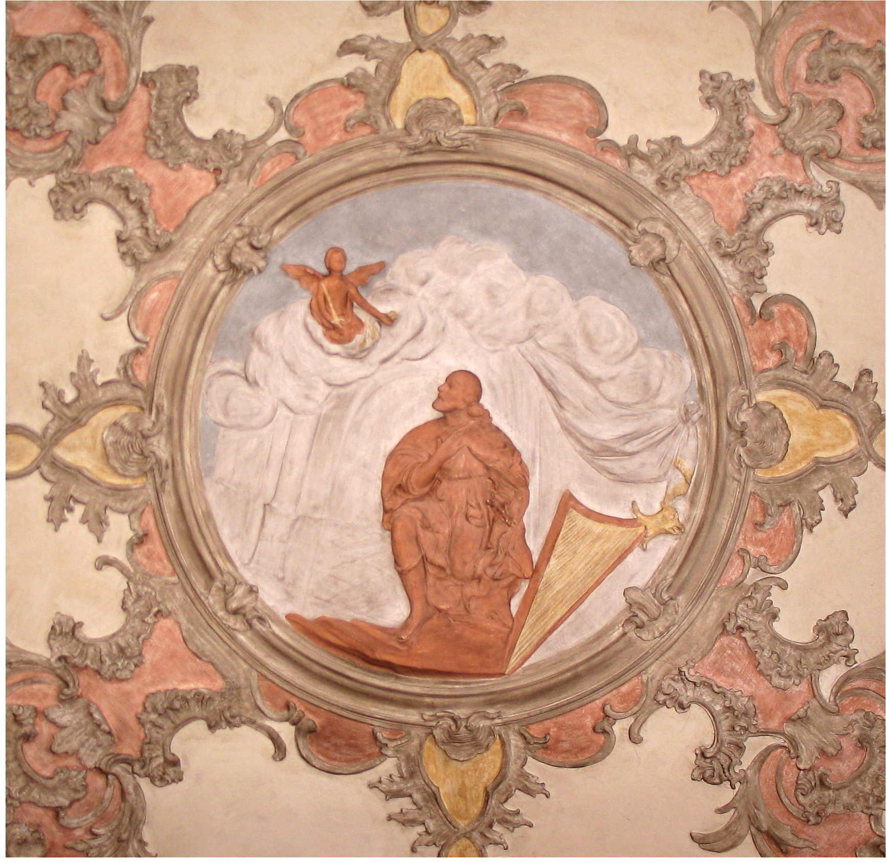 De Plafong am Säiteschëff an der St. Gangolkierch zu Tréier.